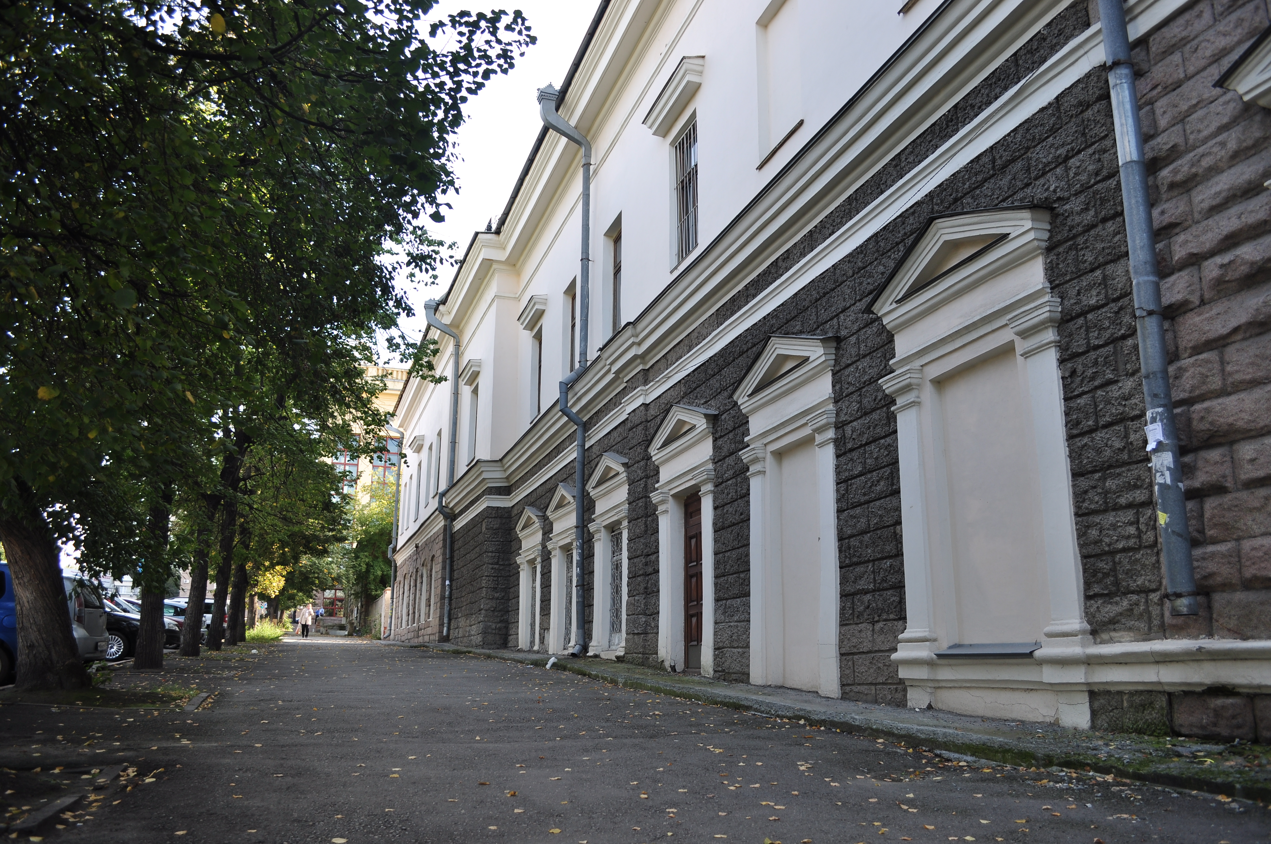 Народный дом (Челябинская область, Челябинск, Кирова улица, 116)